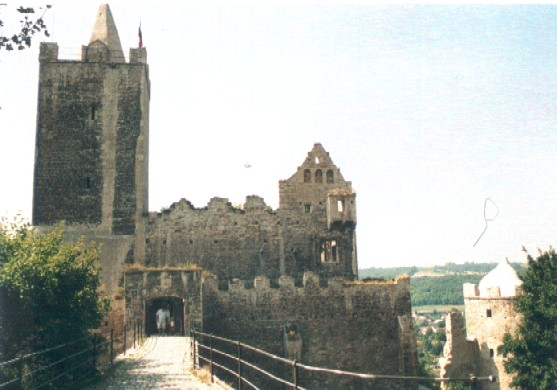 Ruine der Rudelsburg bei Bad Kösen (Bergfried, Tor, Palas / Ruin of the Rudelsburg near Bad Kösen (Germany): Tower, Gate, Palas